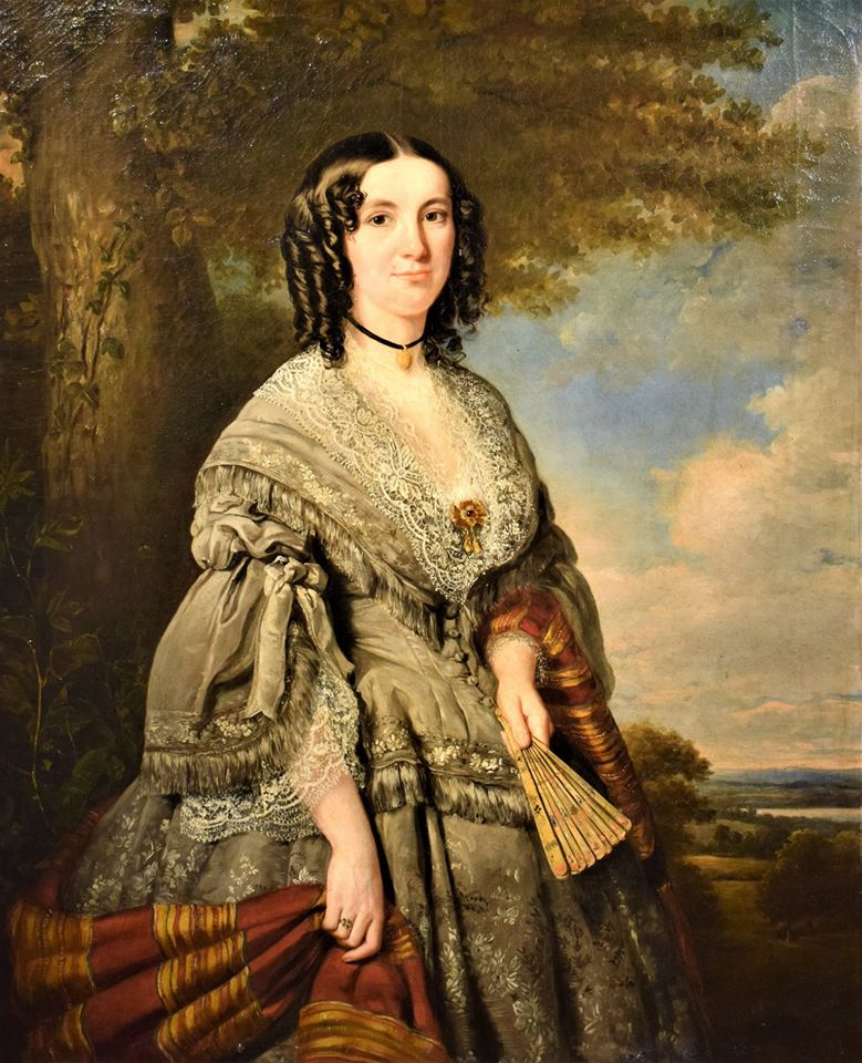 Елена Павловна Бибикова (1812-1888), падчерица А. Х. Бенкендорфа, фрейлина, статс-дама; в первом браке Белосельская-Белозельская, во втором Кочубей.